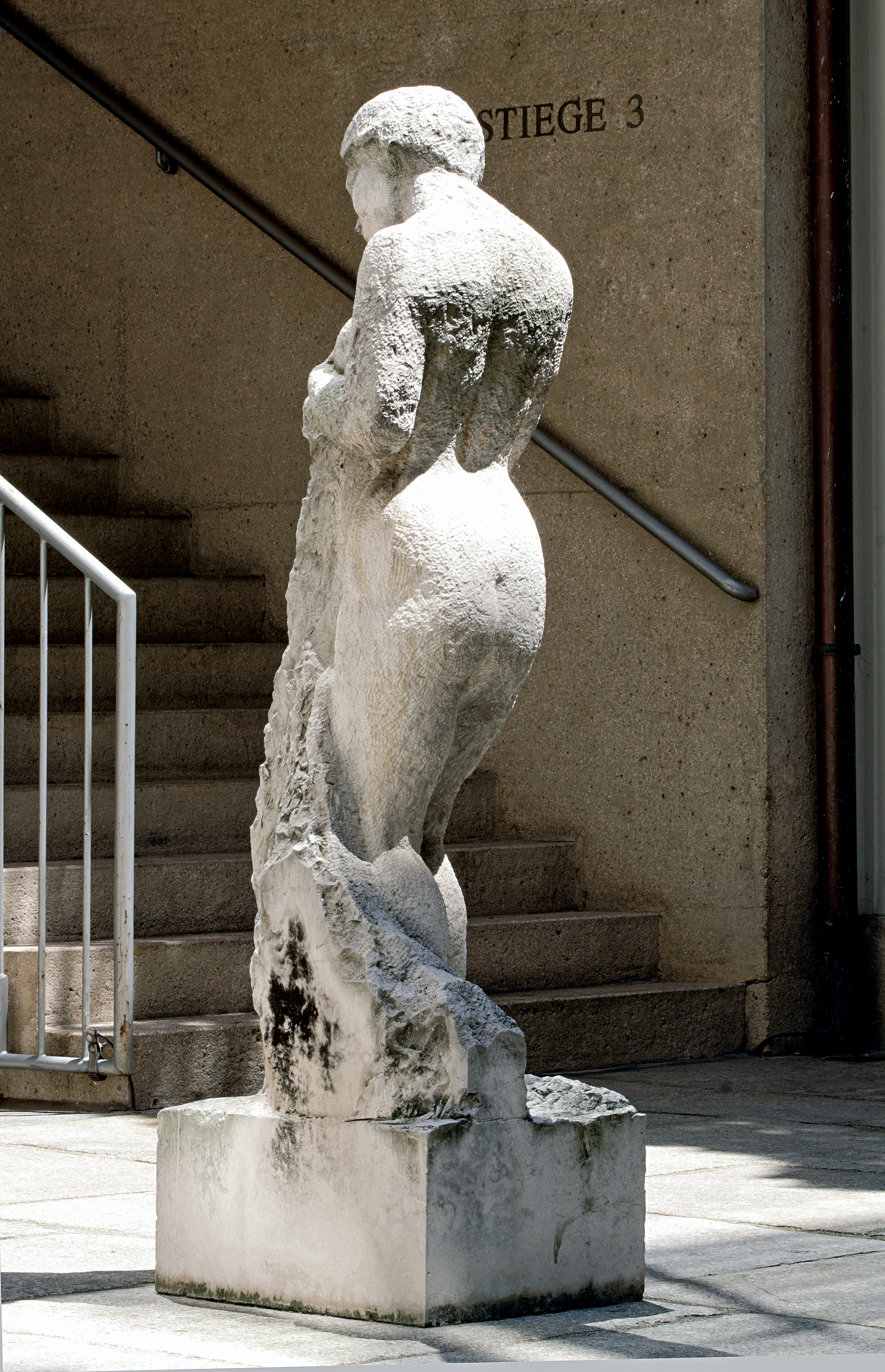 Hommage a Courbet, Skulptur von Hortensia (Hortensia Fussy), 1988-1995